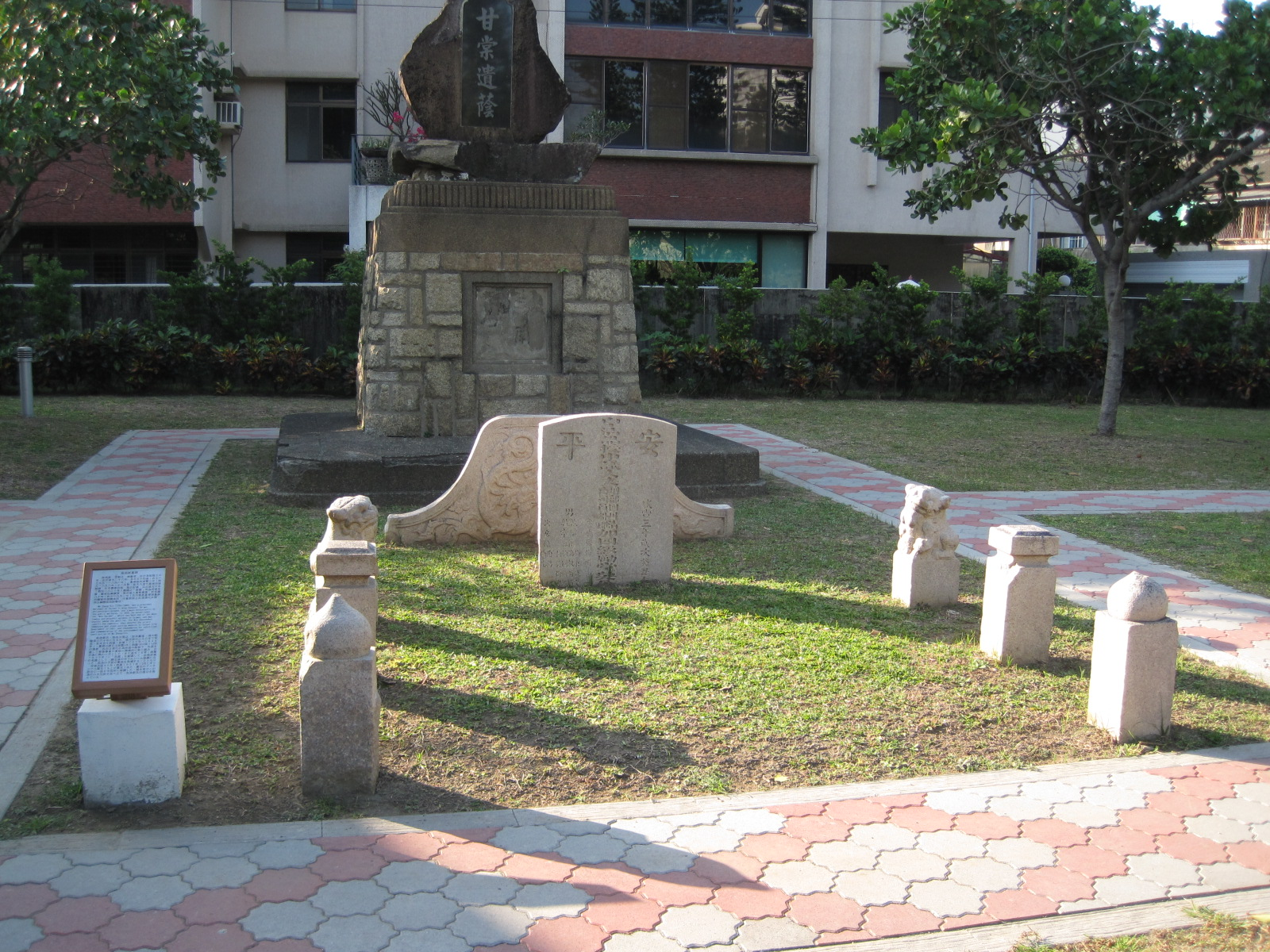 中文（台灣）: 臺南清代鹽商吳尚新之墓碑，位於南門公園裡。